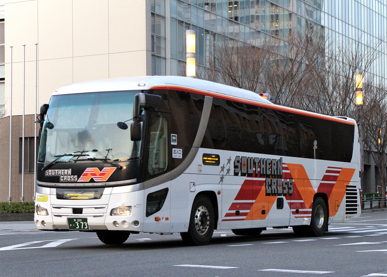 登録番号 堺200か･373 南海バス㈱堺営業所所属 夜行用車両 （サザンクロス） 2019年2月26日 大阪市内にて撮影 撮影者 Zondag2000